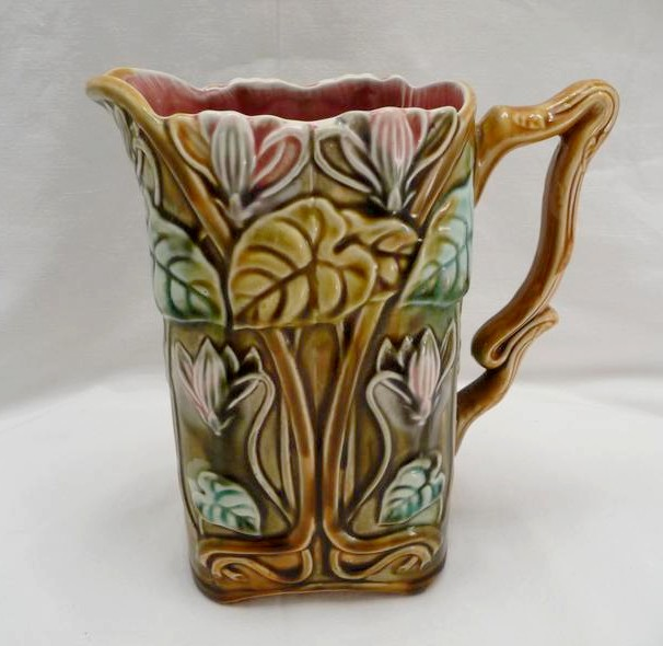 Pichet Cyclamens, n° 726, Faïence d'Onnaing, France XIXe siècle